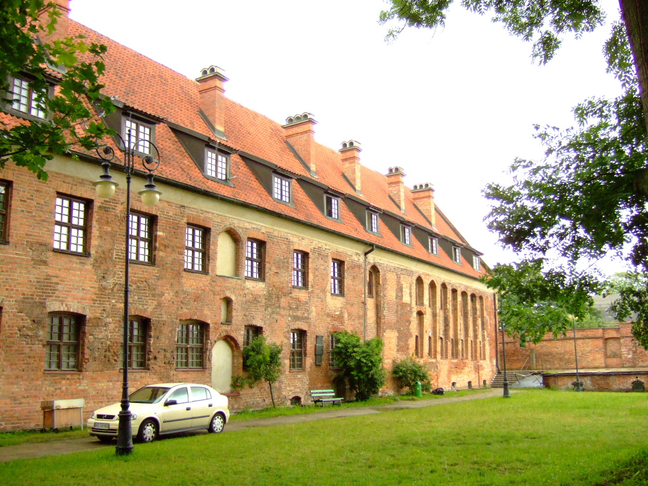 Elbląg, Bulwar Zygmunta Augusta 11 dawniej ul. Wybrzeżna) gimnazjum i budynek podzamcza, obecnie Muzeum Elbląskie